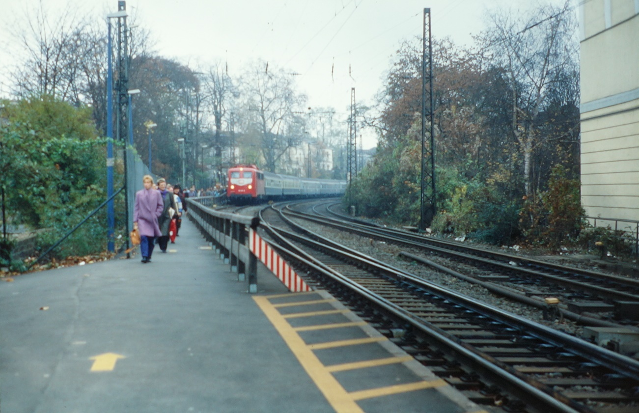 Am 2. Juni 1991 wurde ein neues und wesentlich dichteres Fahrplankonzept auf der Linken Rheinstrecke eingeführt, es beruhte auf Überholungen zwischen Nah- und Fernverkehrszügen in allen Knotenbahnhöfen. Da in Bonn Hbf zu diesem Zeitpunkt für Fahrten nach Norden regulär nur Gleis 1 verfügbar war, wurde provisorisch ein abseits gelegenes Gleis 9 Süd mit Holzbahnsteig errichtet, an welchem die Nahverkehrs- und Eilzüge in Richtung Köln hielten, während IC und IR auf Gleis 1 verkehrten. Am 26. Oktober 1992 waren die Erweiterungen der Gleisanlagen abgeschlossen, so dass von da an die Nahverkehrszüge nach Norden von Gleis 2 verkehrten und Gleis 9 Süd samt Weichen und Behelfsbahnsteig anschließend wieder abgebaut wurde. Das Foto zeigt Zug E 3520 Koblenz - Köln (werktags außer samstags weiter bis Wuppertal-Oberbarmen), welcher am 2. Dezember 1991 pünktlich um 10.03 Uhr auf dem Bonner Gleis 9 Süd eingetroffen ist, fotografiert vom südlichen Ende des Bahnsteigs 1, auf welchem gelbe Pfeile den Weg nach Gleis 9 Süd wiesen. Der abgebildete Eilzug wurde dort von IC 618 "Gutenberg" (Stuttgart - Münster) überholt (Bonn planmäßig an 10.07, ab 10.09). Solche Überholungen fanden zweimal pro Stunde statt. Rechts neben dem Eilzug verlaufen die beiden Hauptgleise der Rheinstrecke in Richtung Koblenz.